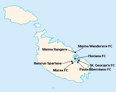 Répartition des clubs en First Division Maltaise 1934-1935.